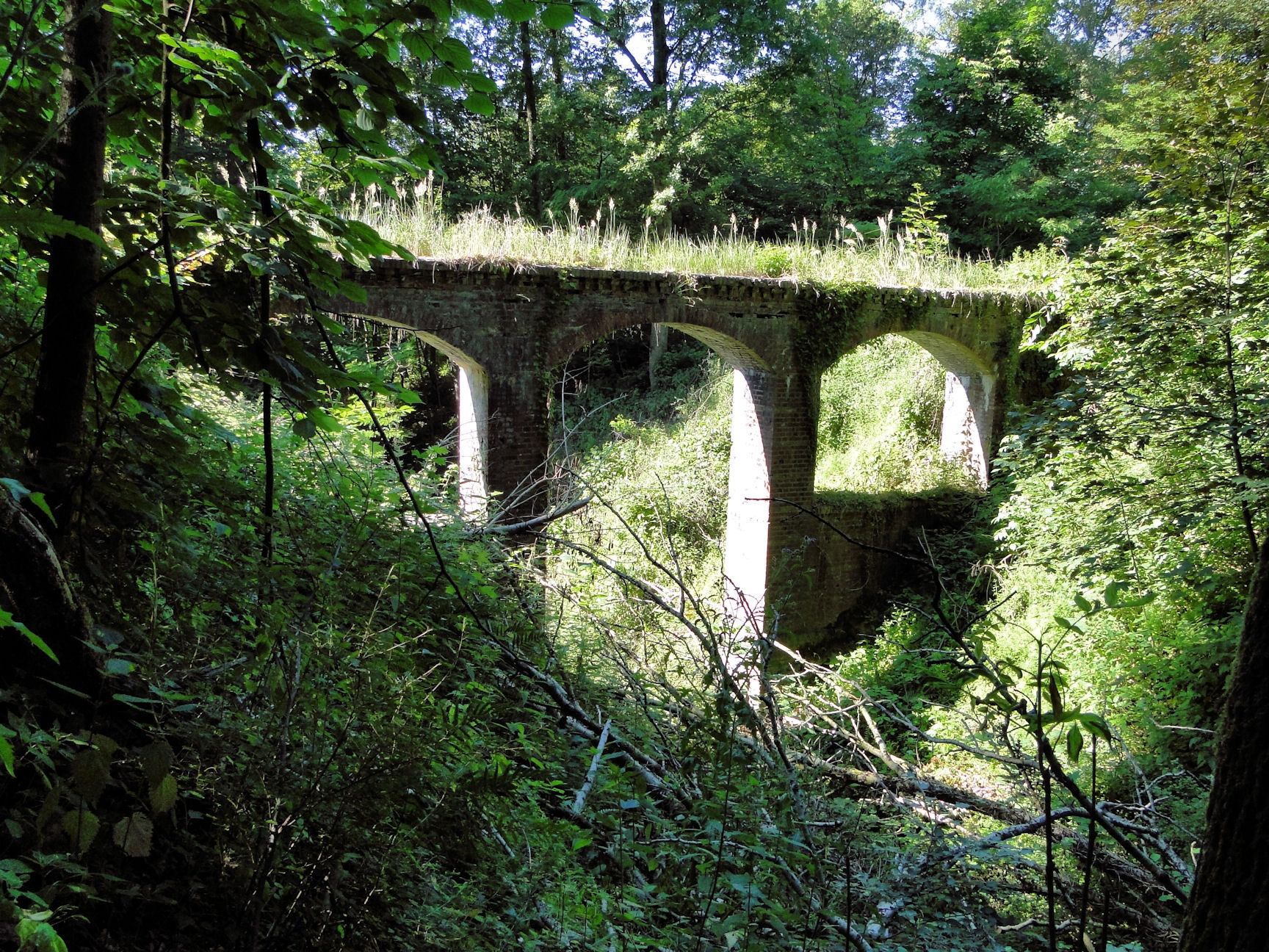 Mostek technologiczny dawnej kopalni kredy w Szczecinie Zdrojach (nie mylić z mostkiem znajdującym się tuż przy Jeziorze Szmaragdowym)